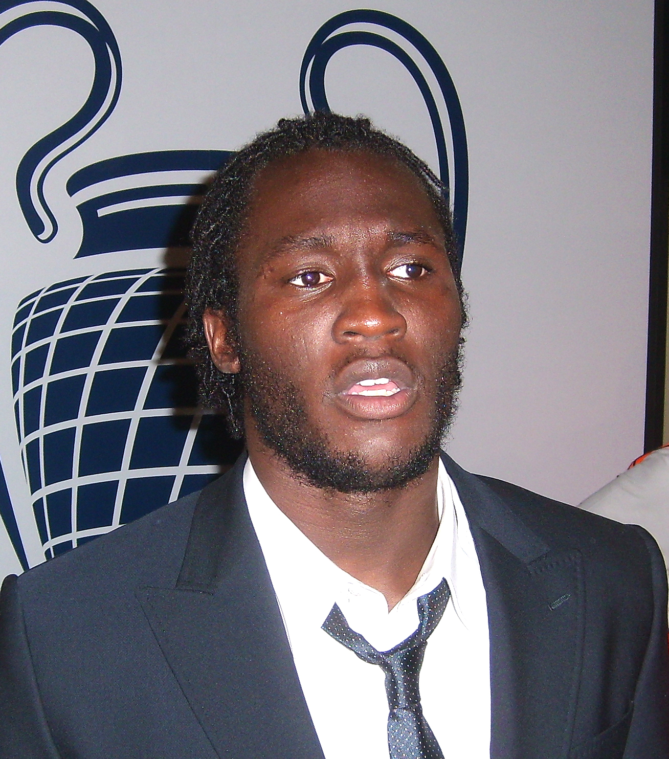 Romelu Lukaku in München nach der Champions League 2012